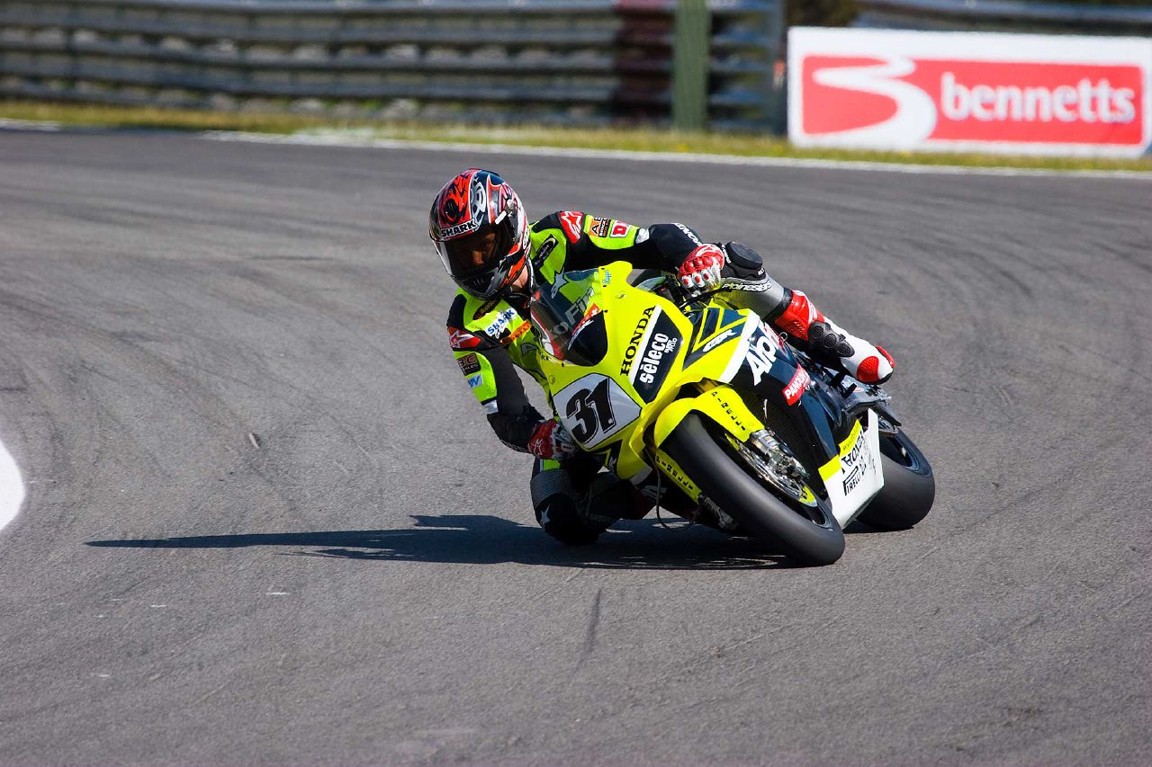 Karl Muggeridge WSBK Round 10 Brands Hatch 2007